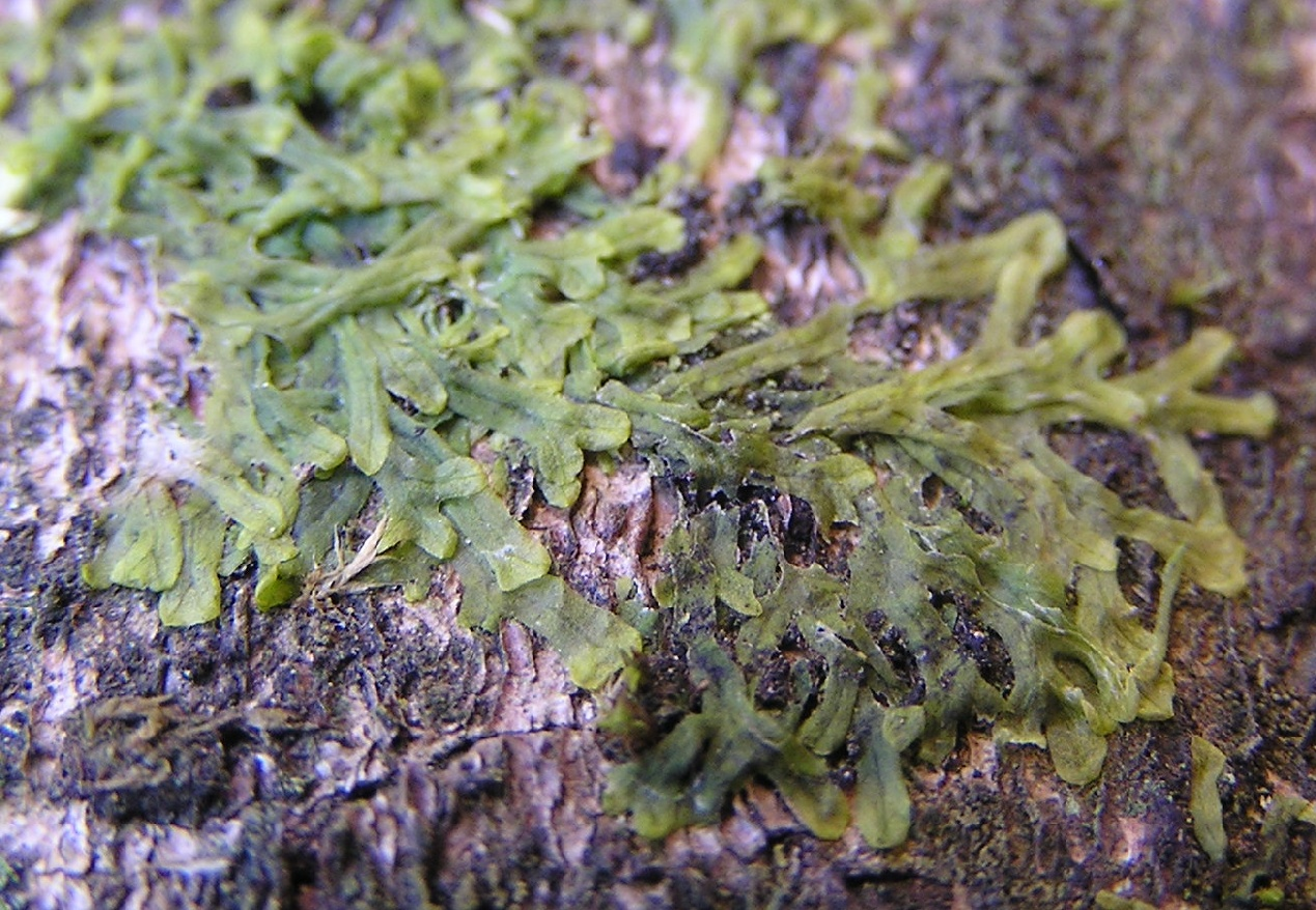 Metzgeria furcata auf Rinde in der Wolfsschlucht bei Eberbach am Neckar (Deutschland).